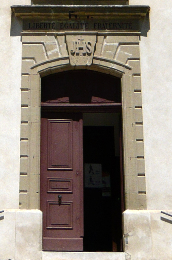 Porte d'entrée de l'église de Lamanon, Bouches-du-Rhône (France). Mentions "R.F. Liberté Égalité Fraternité" et "JHS" (Monogramme de Jésus).